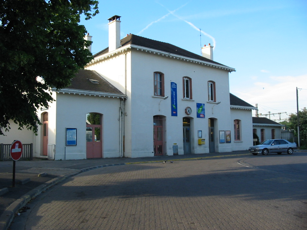 gare de Massy-Palaiseau (SNCF), RER C, France